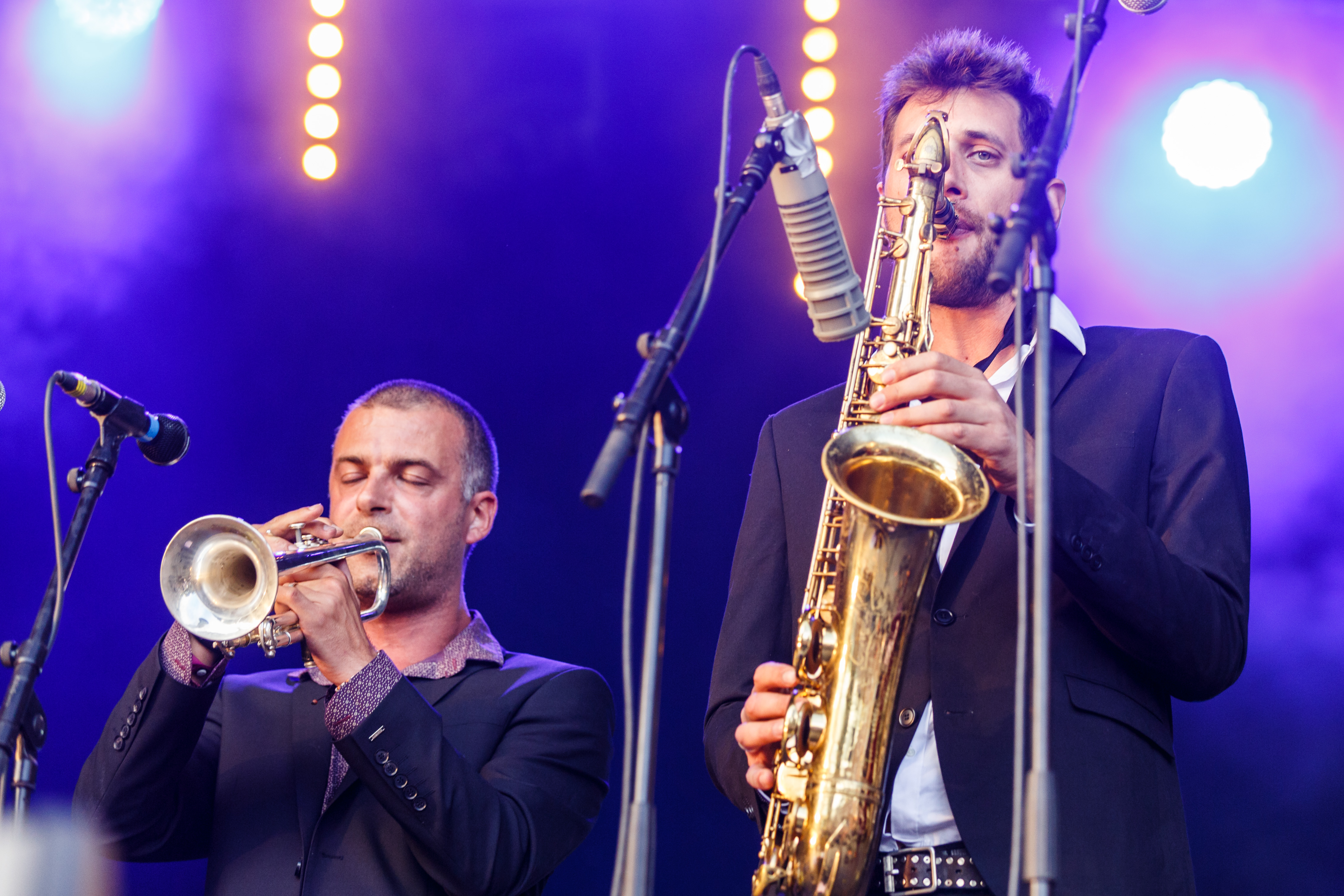 Jim Murple Memorial en concert au festival de Buguélès à Penvénan (22) le 30 juillet 2016.